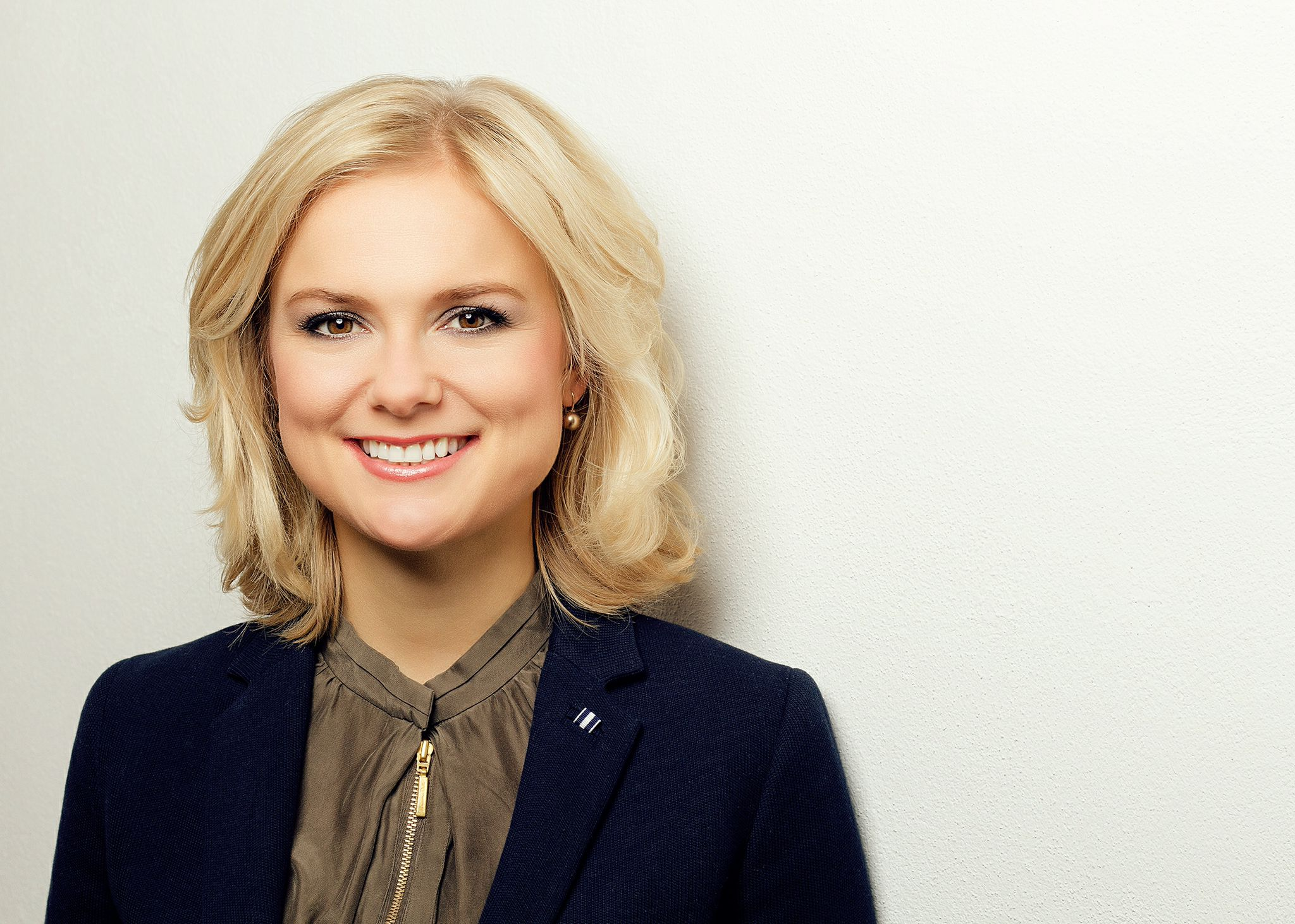 Angela Knäble